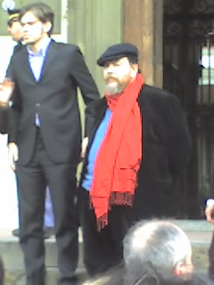 Giuliano Ferrara a Firenze